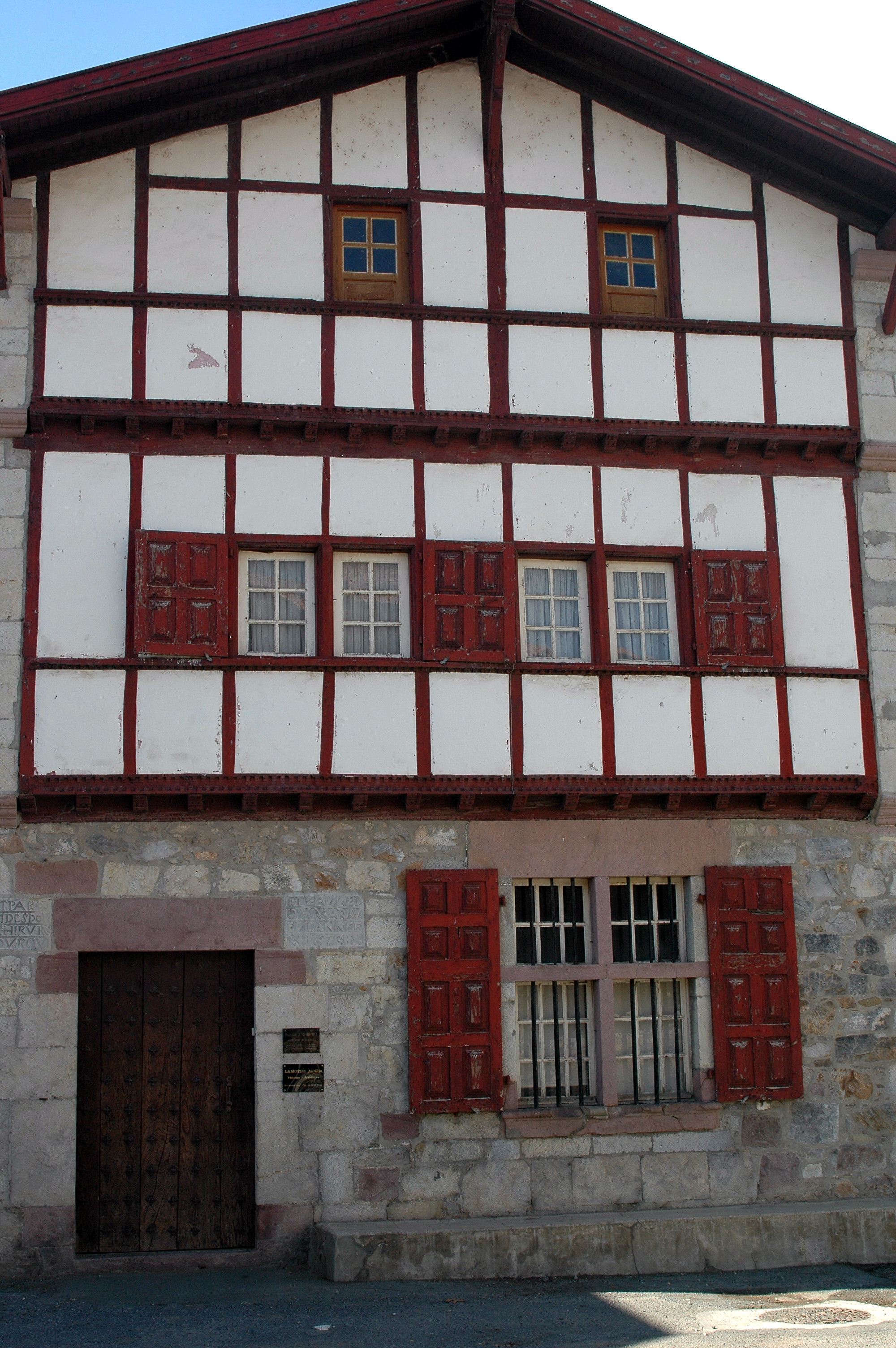 Ossès, maison basque. Photo prise le 03/08/06 par Harrieta171